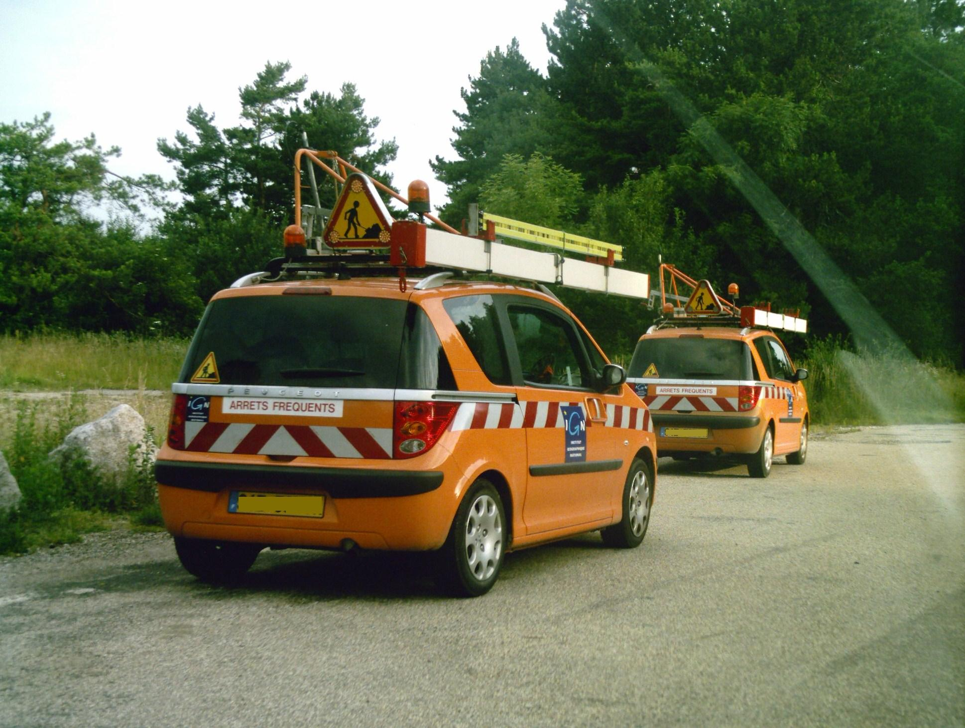 Véhicule de l'Institut géographique national (France)